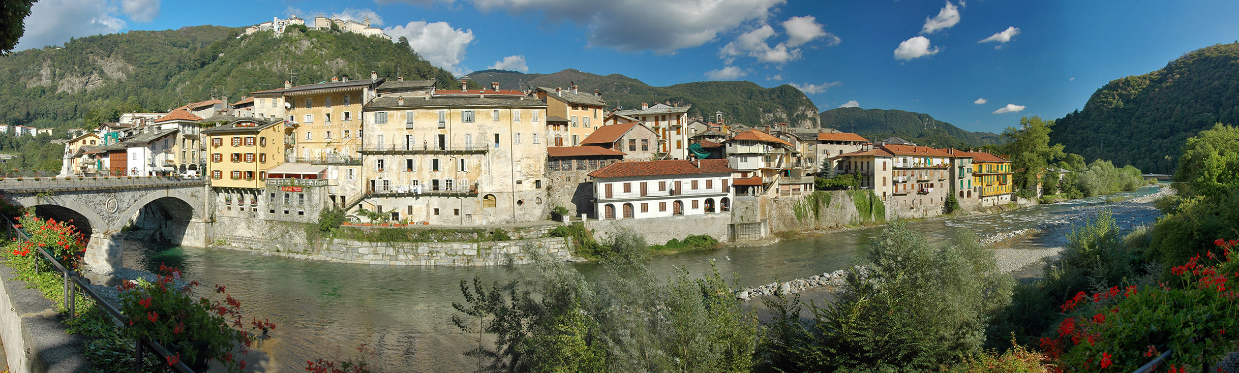 Varallo Sesia (Piemonte)